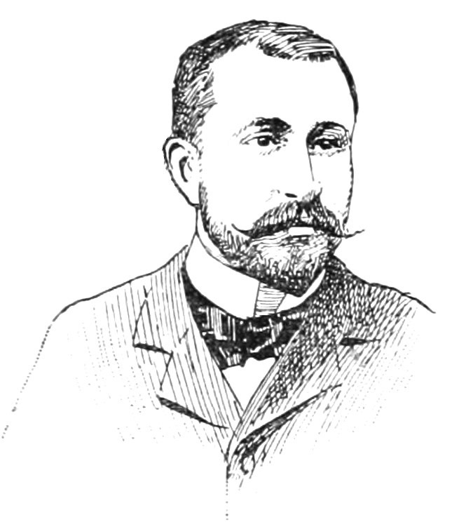 "La Nouvelle Chambre" : "Dussaussoy".